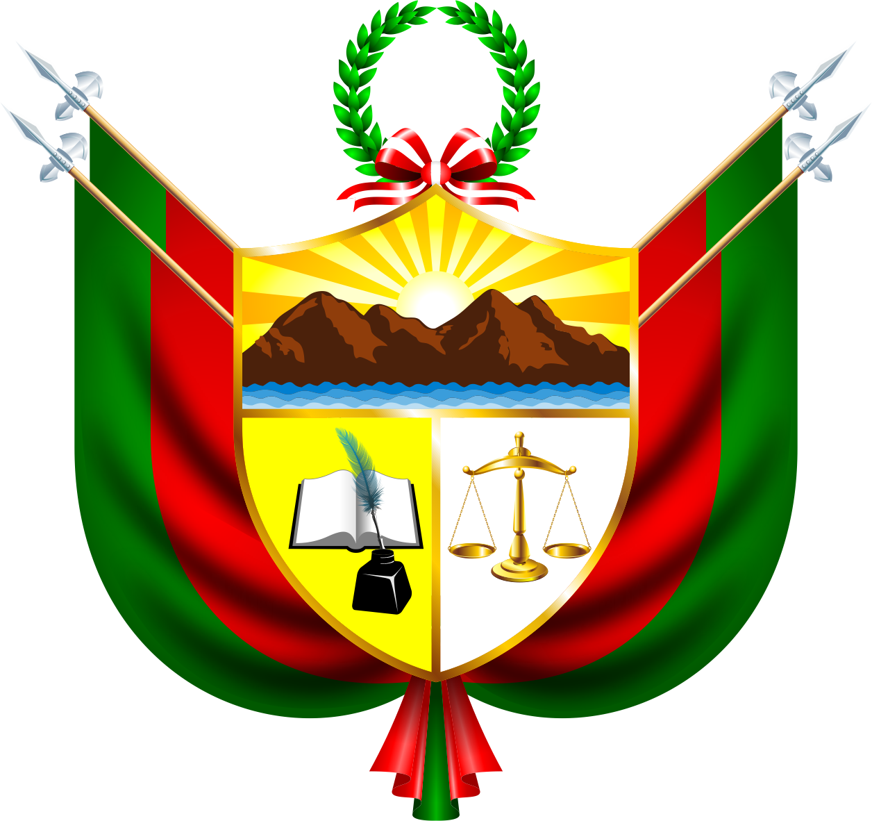 Distrito de Samuel Pastor - Provincia de Camaná - Región Arequipa